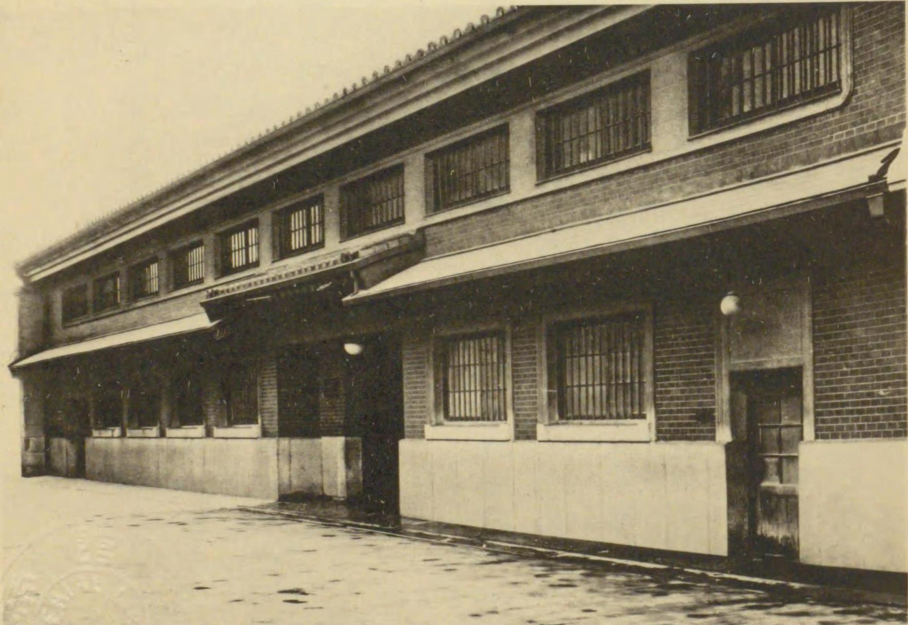 株式会社山中商会本社 高麗橋一丁目